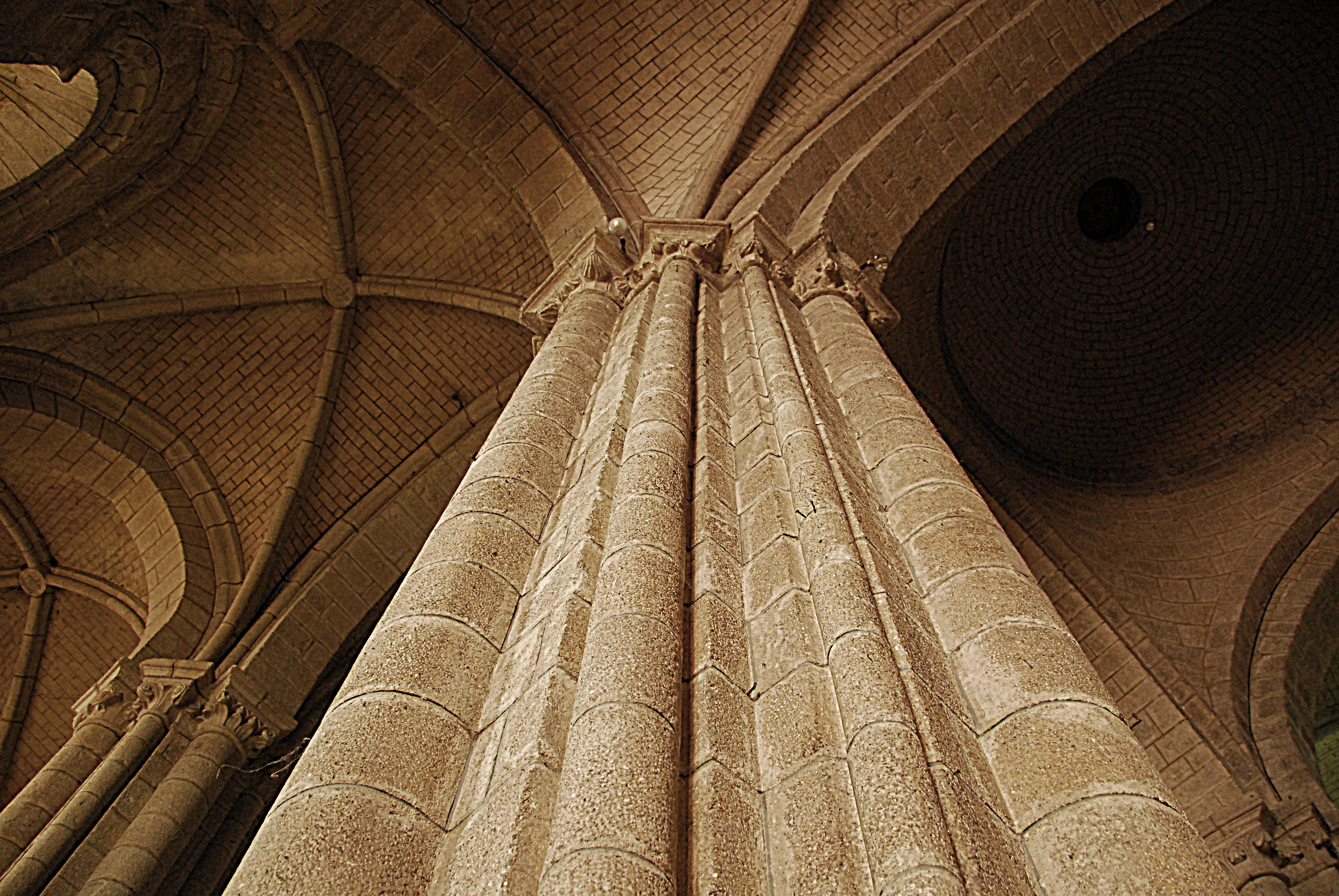 N.-D. de La Souterraine, Vierungsbündelpfeile, links Kapellengewölbe